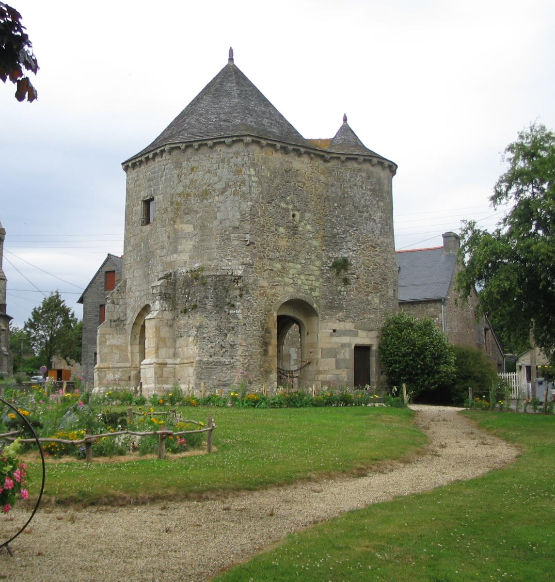 Tour Saint-Eutrope, 13ème siècle, Monument Historique, Langourla, Côtes d'Armor, France